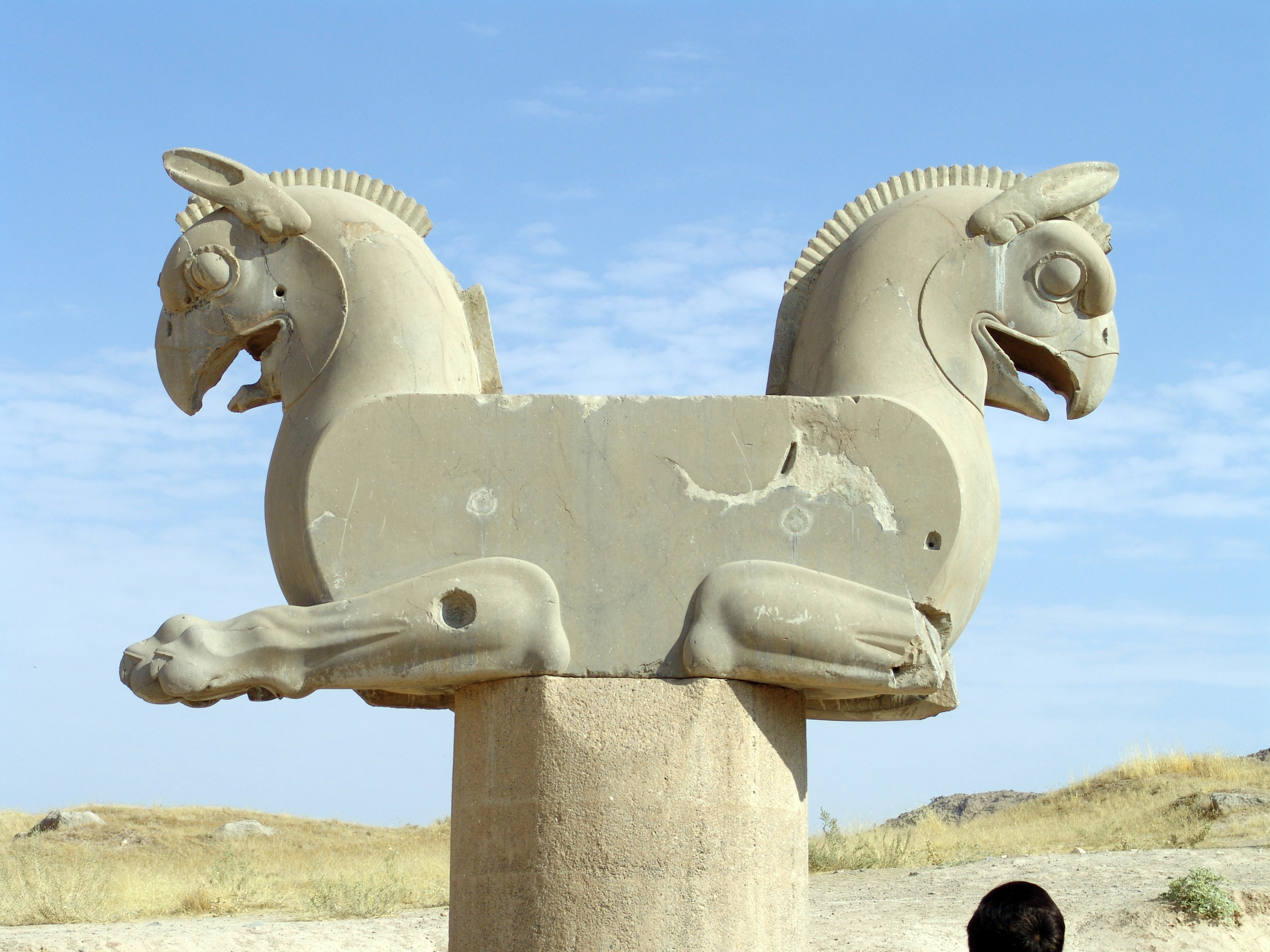 تندیس اسطوره‌ای پرندهٔ هما در تخت‌جمشید